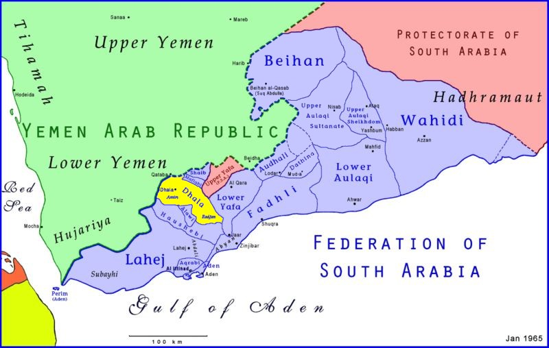 Ubicación de Dhala dentro de la Federación de Arabia del Sur